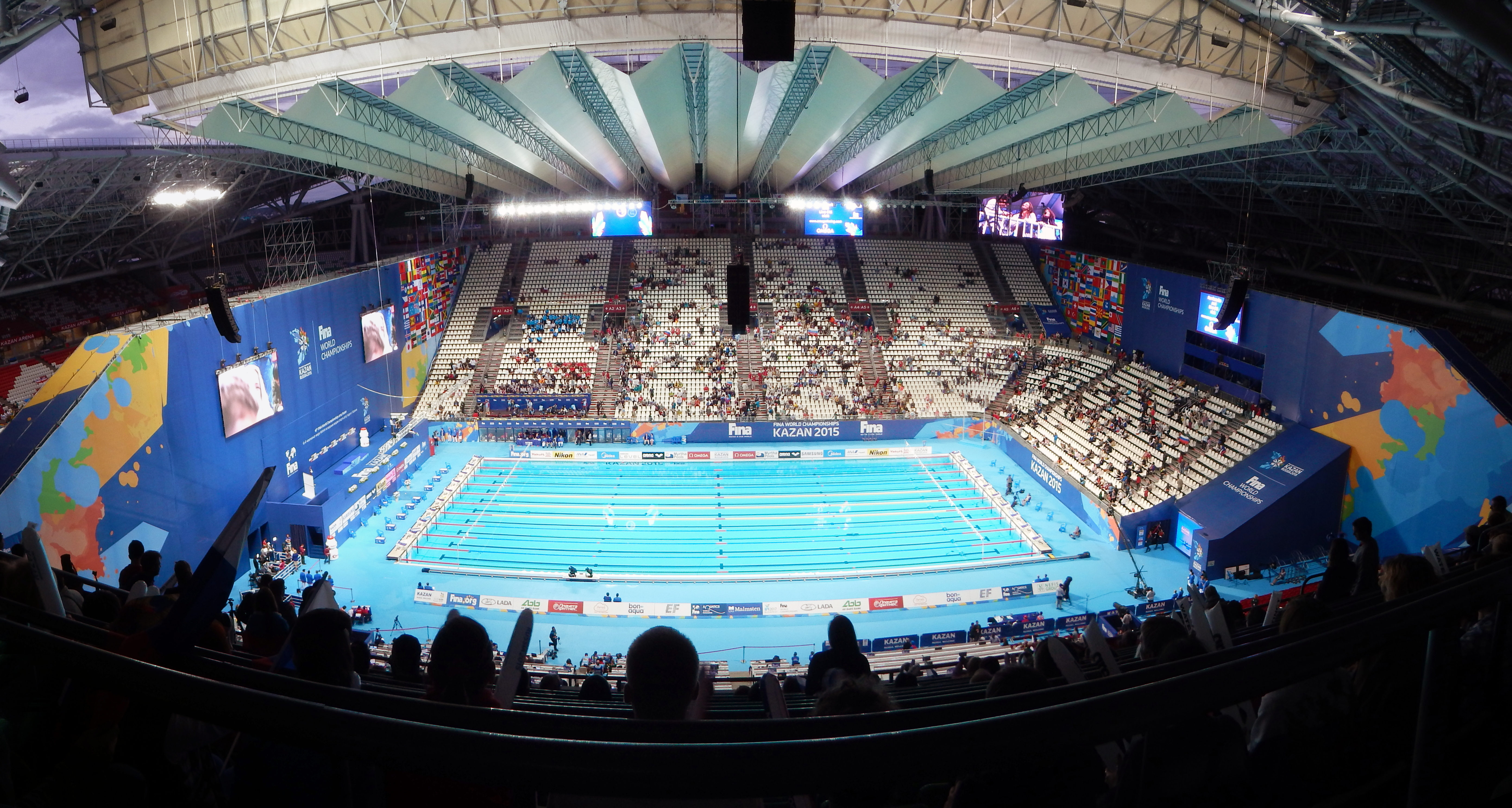 Панорама Казань Арены с сектора 306